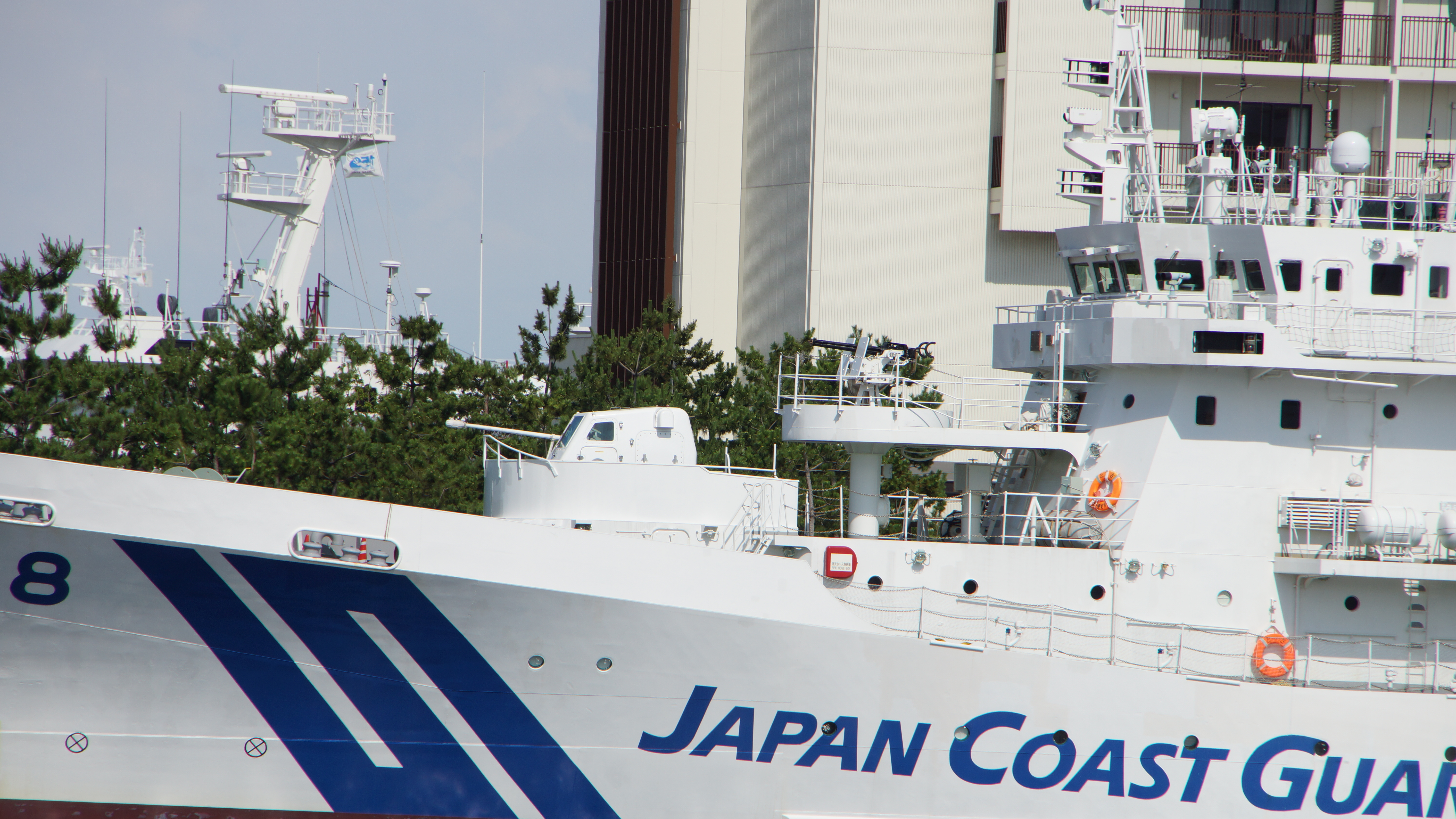 海上保安庁 巡視船とさ（PL-08） 船首前方のエリコン35mm機関砲及びJM61-M 20mm多銃身機銃 左舷側面。2017年7月22日 神戸港にて。